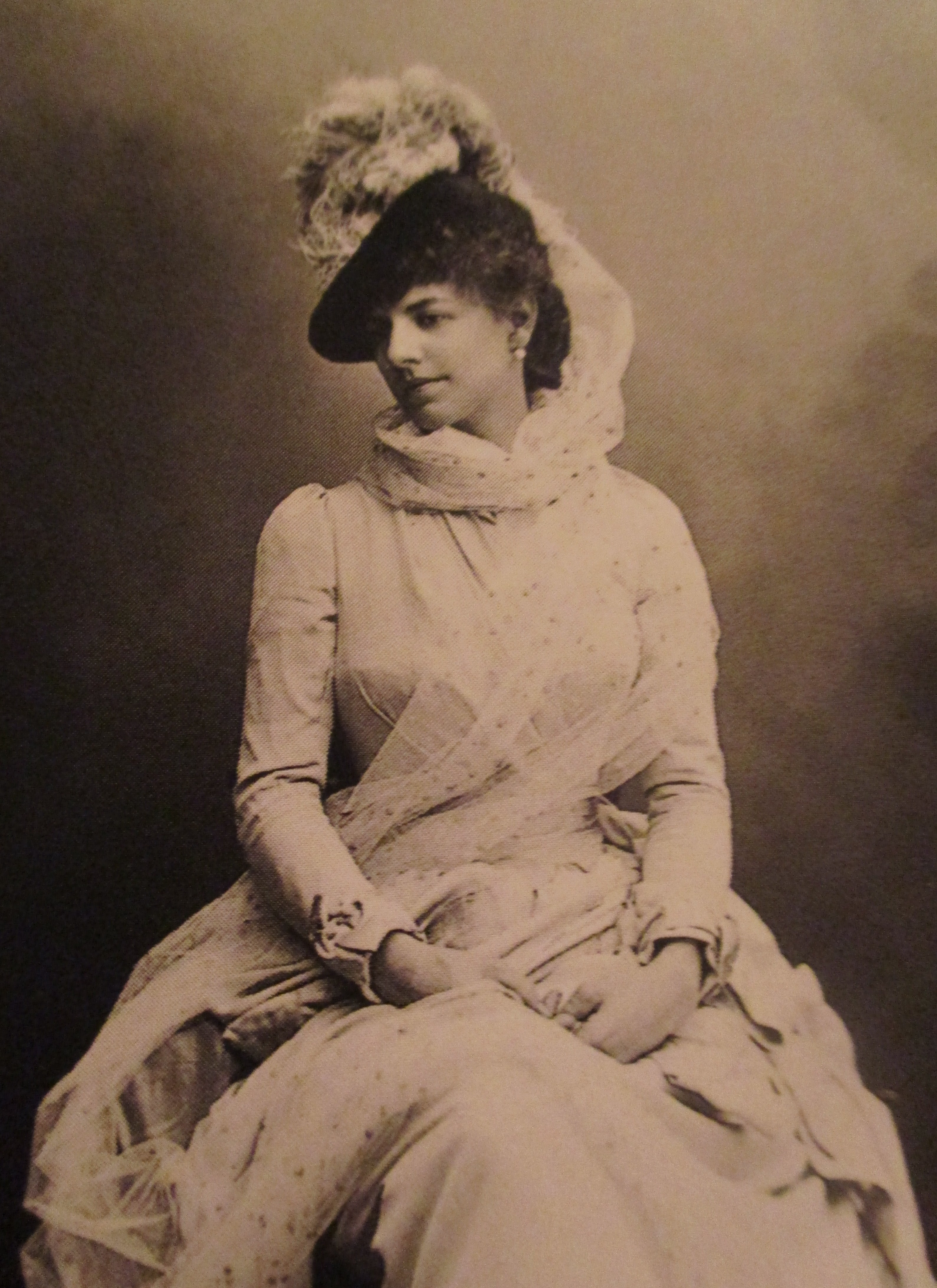 Photographie en 1886 de la comtesse Greffulhe (1860-1952), ,née Caraman-Chimay, par Paul Nadar.